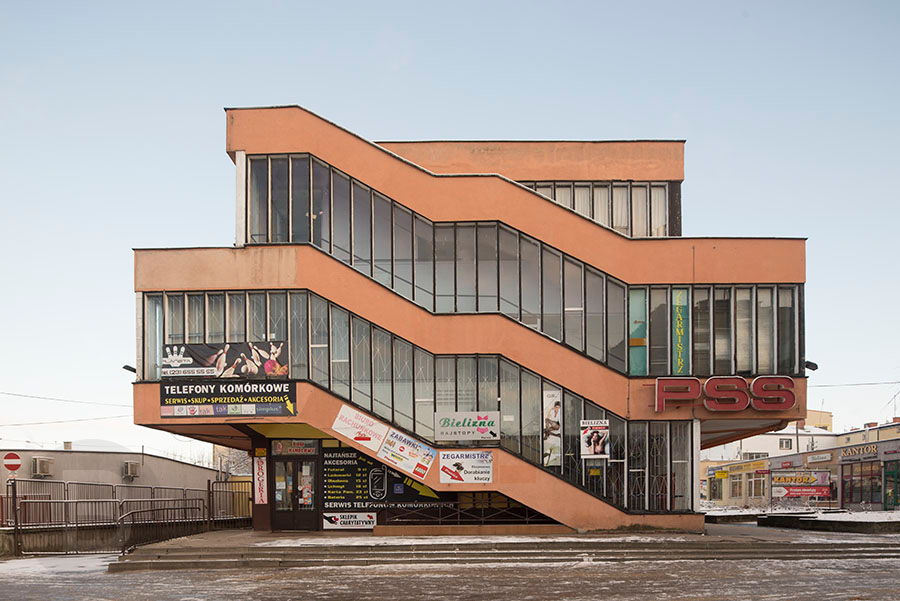 DH Handlowiec, widok elewacji od strony zachodniej.